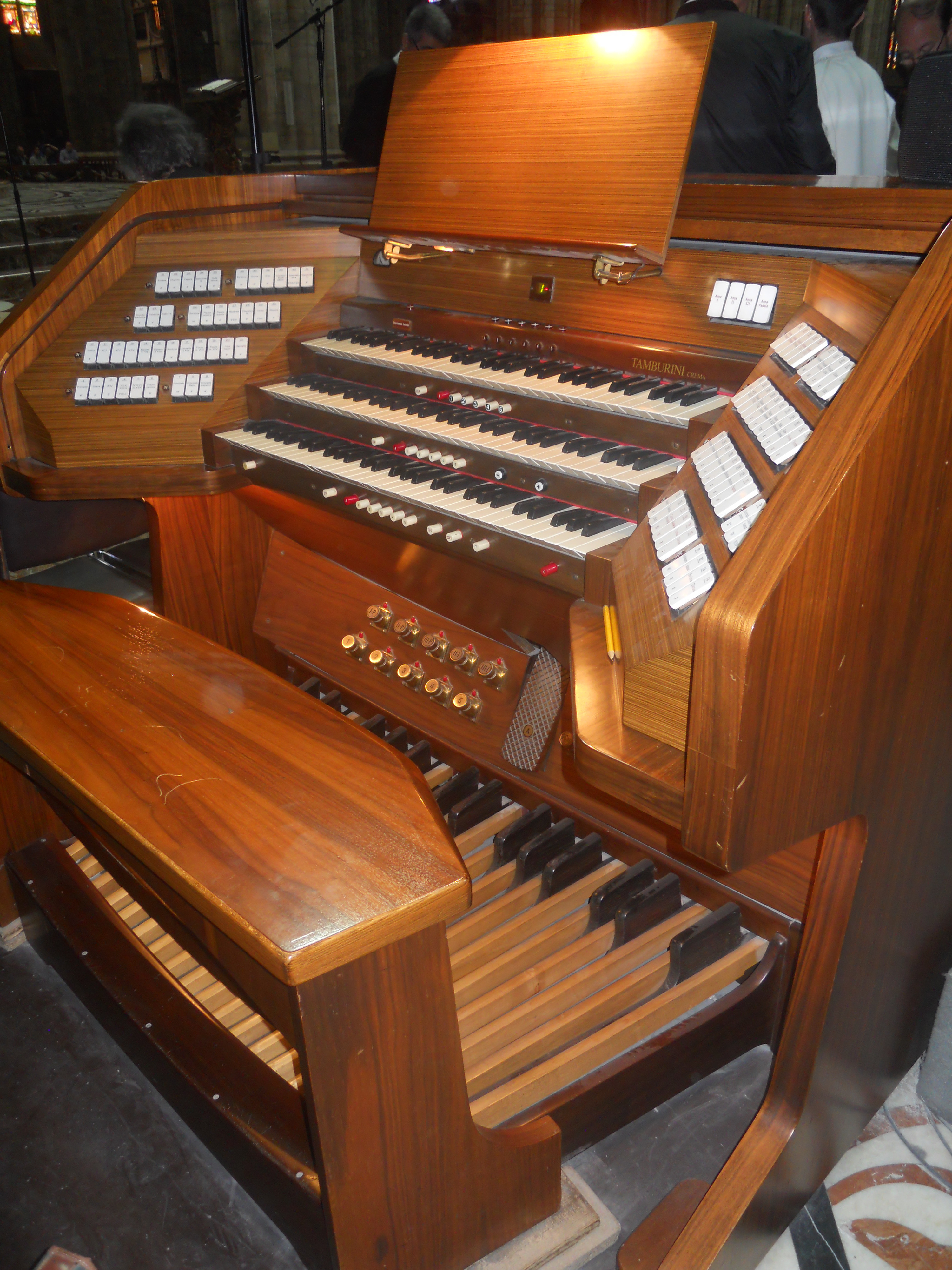 La consolle ausiliaria a tre manuali.